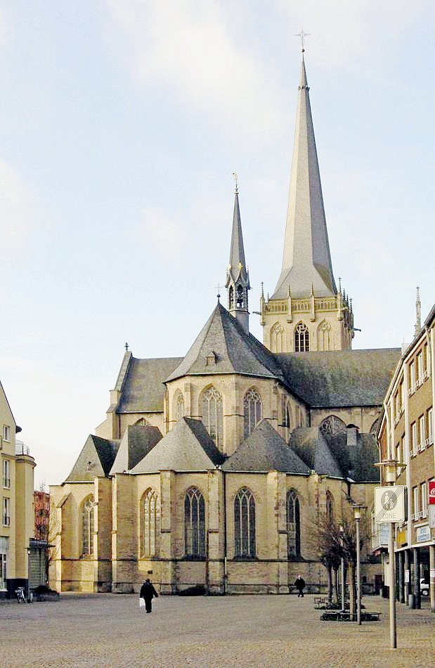 Wesel, Marktplatz mit Blick auf den Willibrordi-Dom